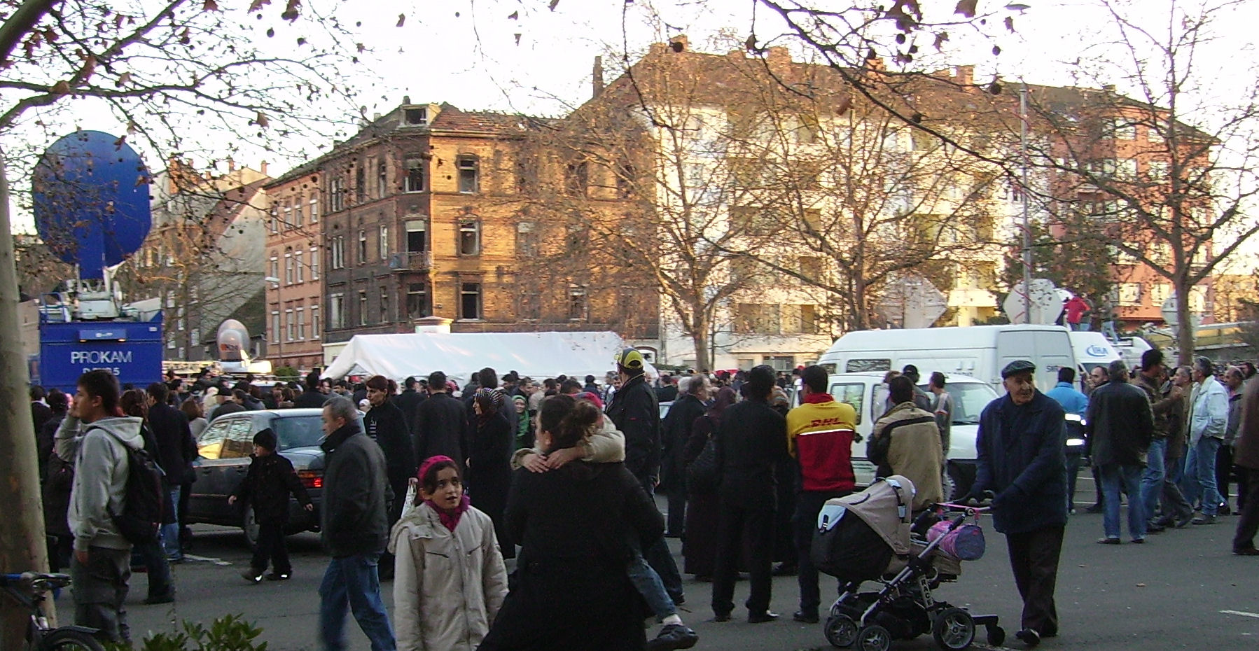 Kurz vor dem Besuch des türkischen Ministerpräsidenten.